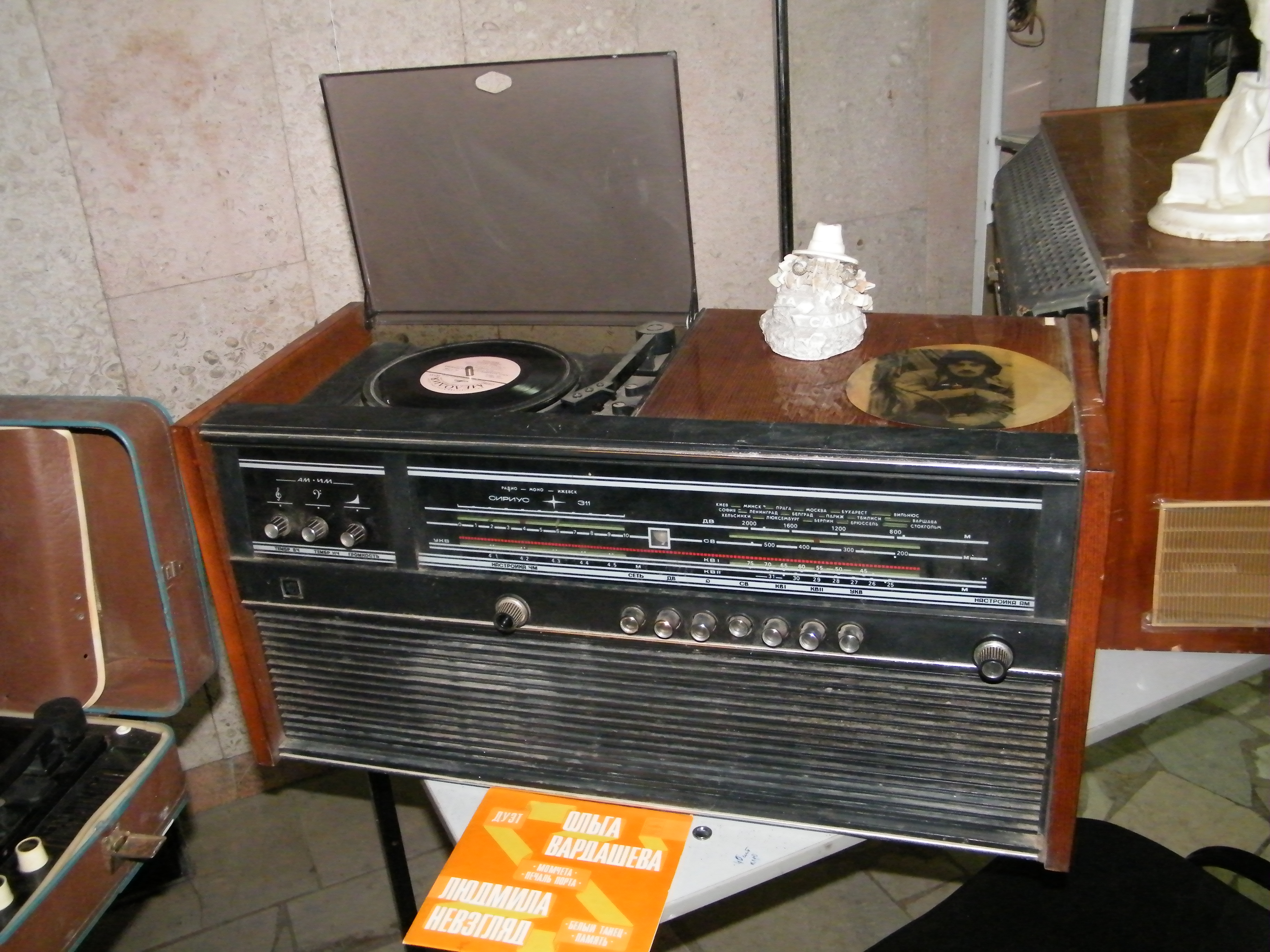 Теплый ламповый звук